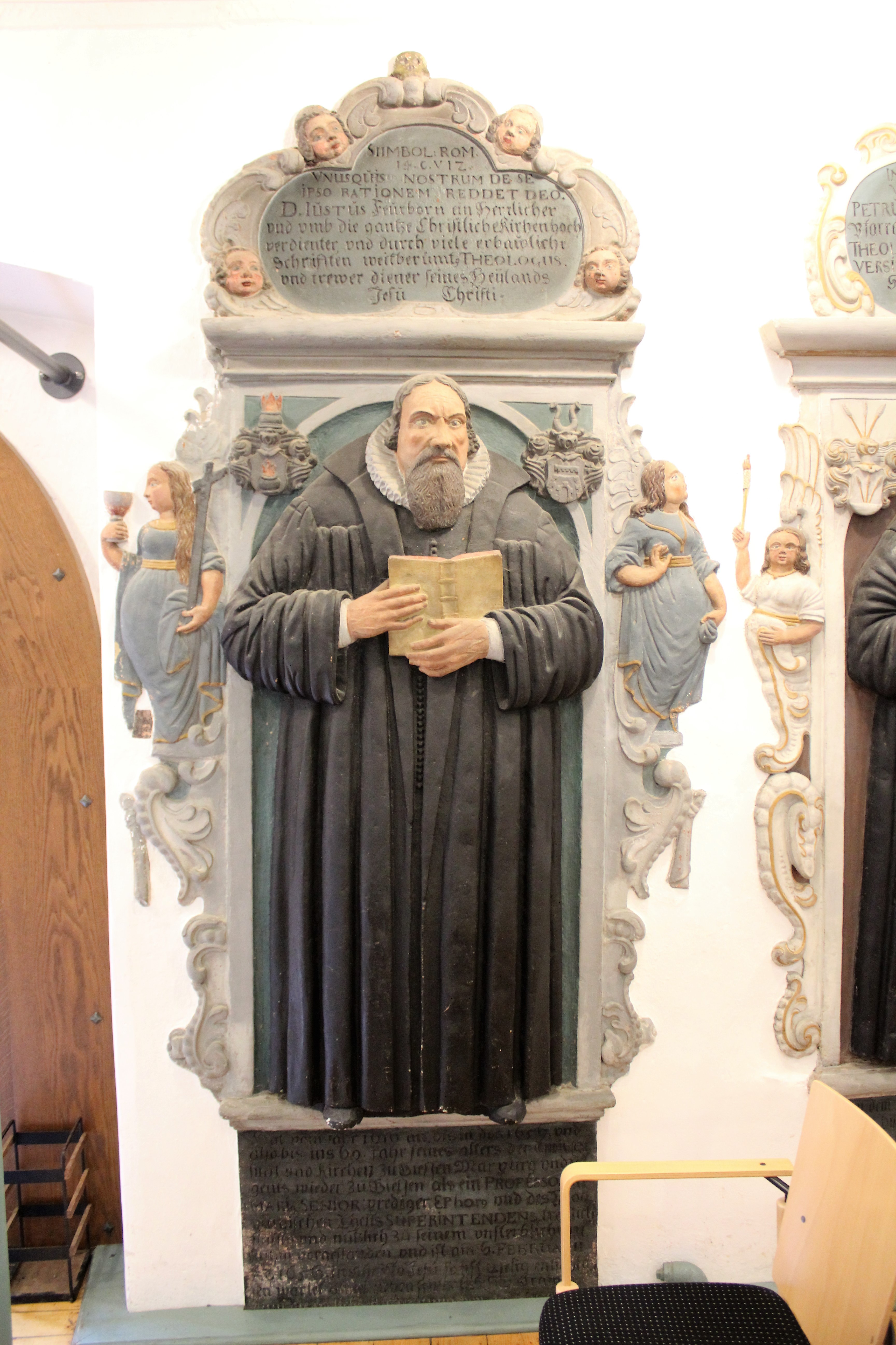 Grabstein in Kapelle Alter Friedhof, Gießen, Hessen, Deutschland